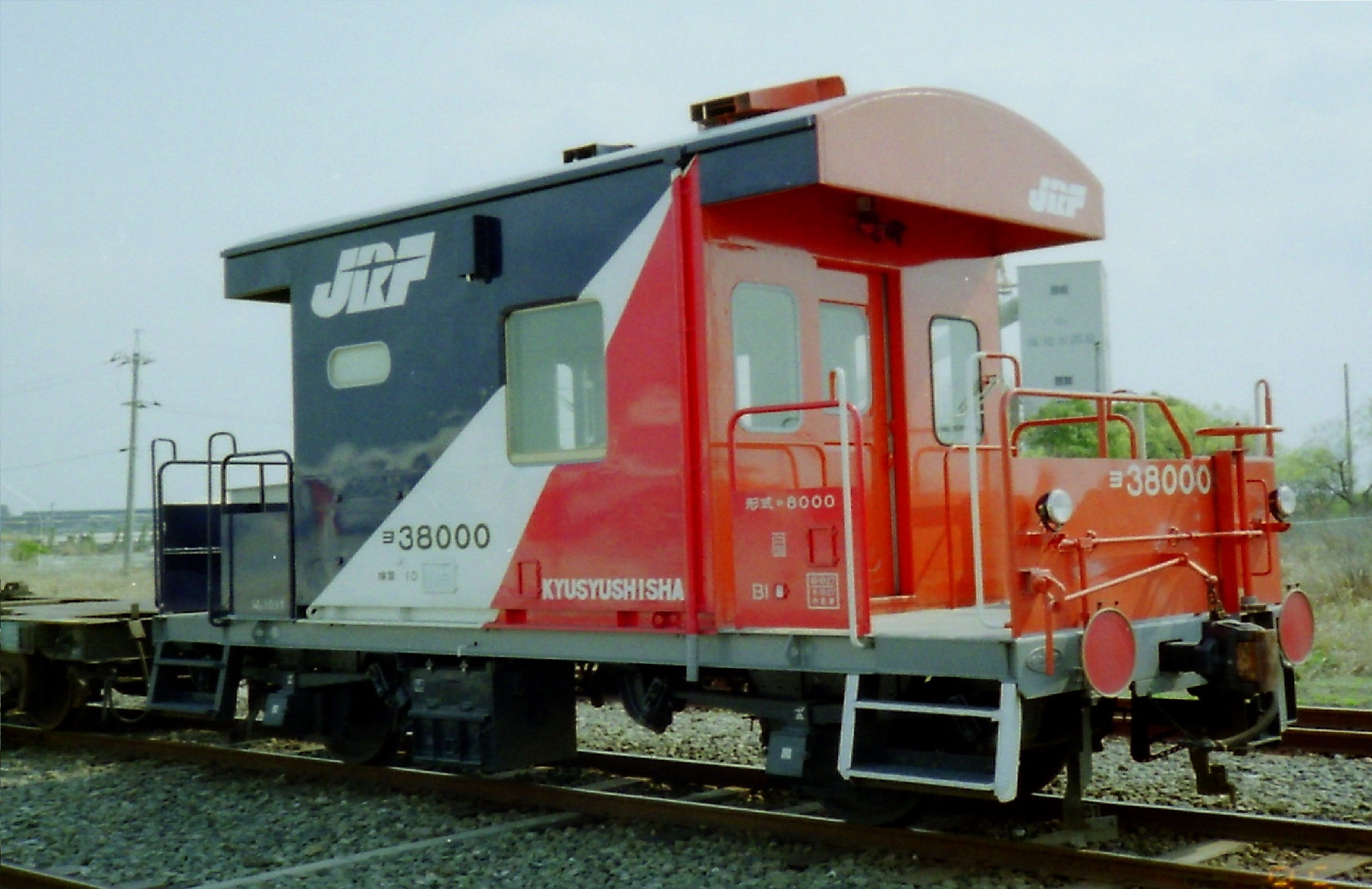 新しく開発された 「 カーパック 」 専用カラー仕様の、ヨ8000型を改造した車掌車。